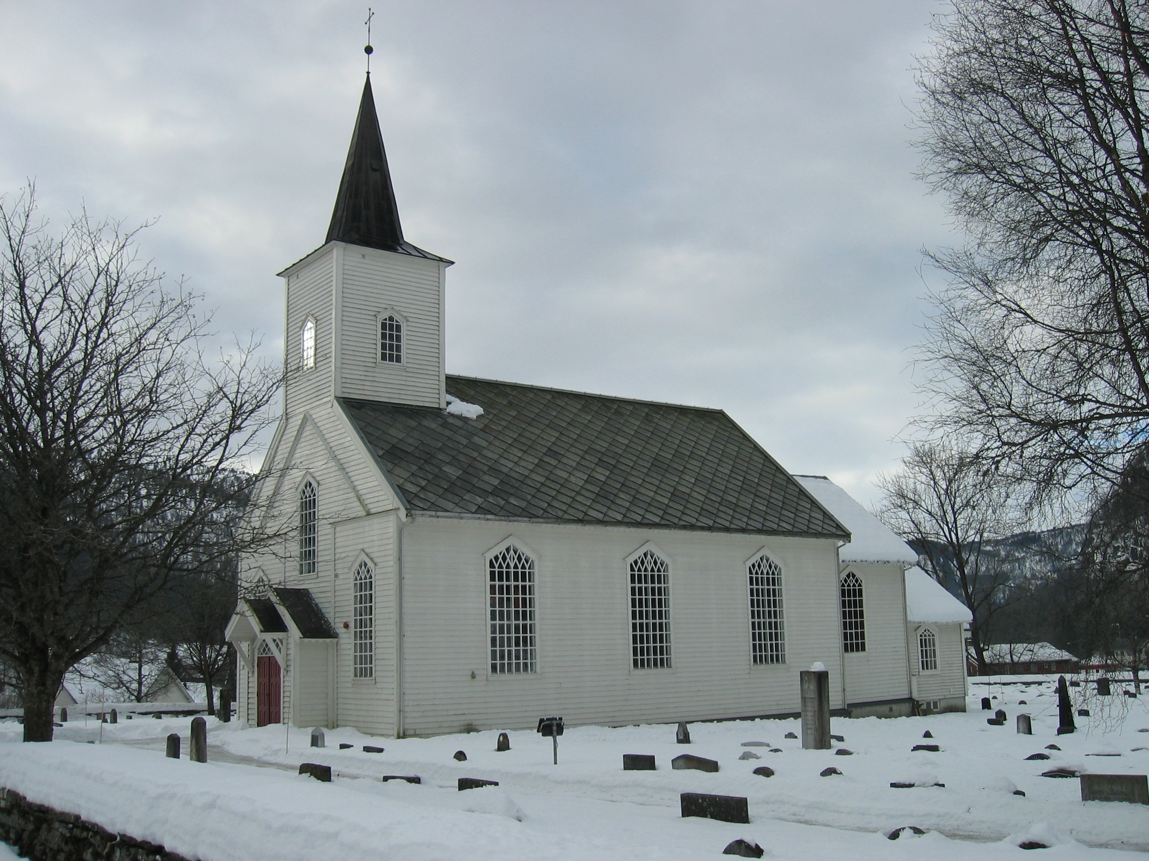 Vinje kyrkje, Voss, Hordaland, Norway